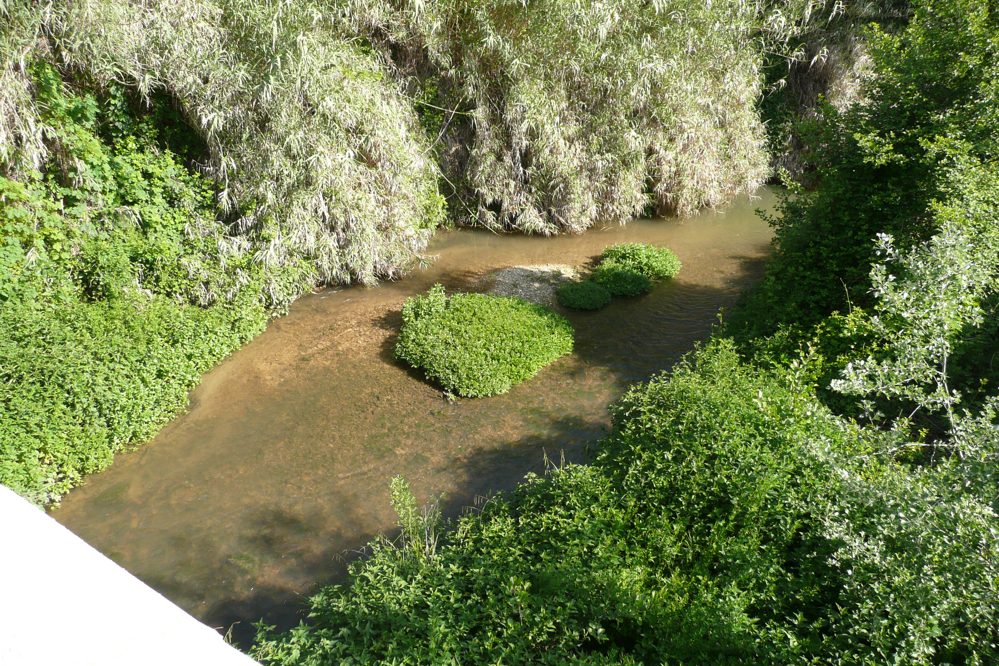 Tave près de Laudun-l'Ardoise.